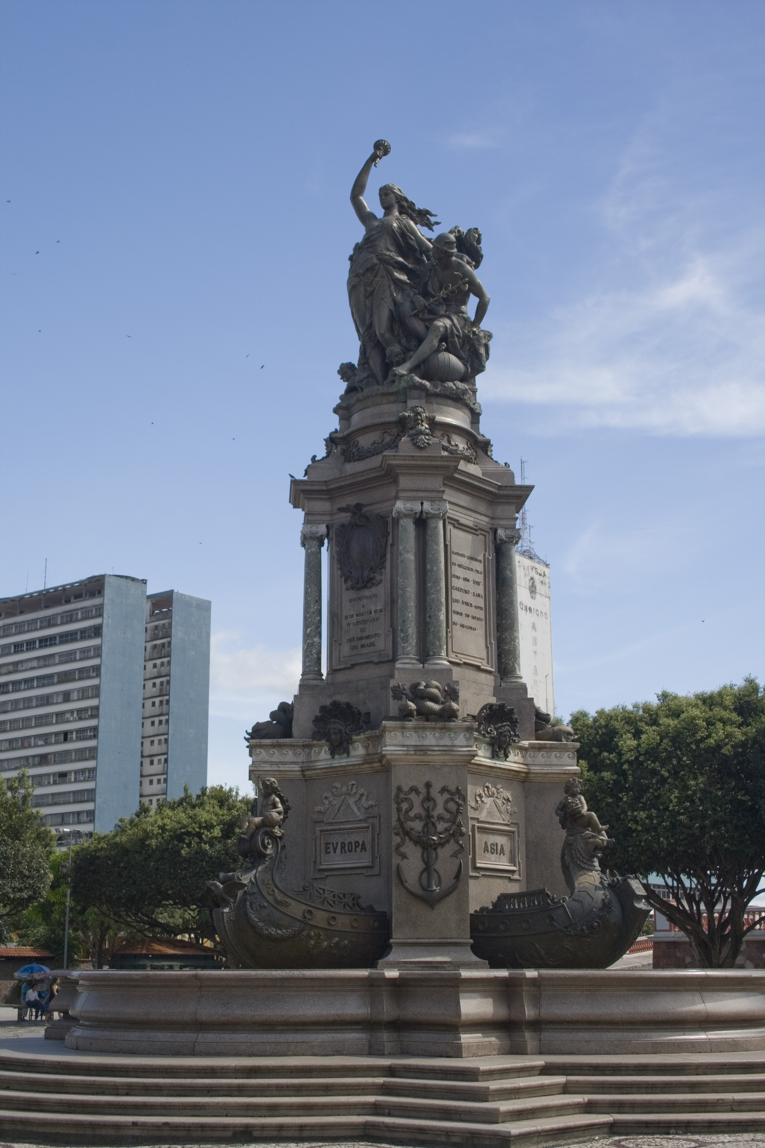 Monumento à Abertura dos Portos - Manaus, Amazonas, Brasil.